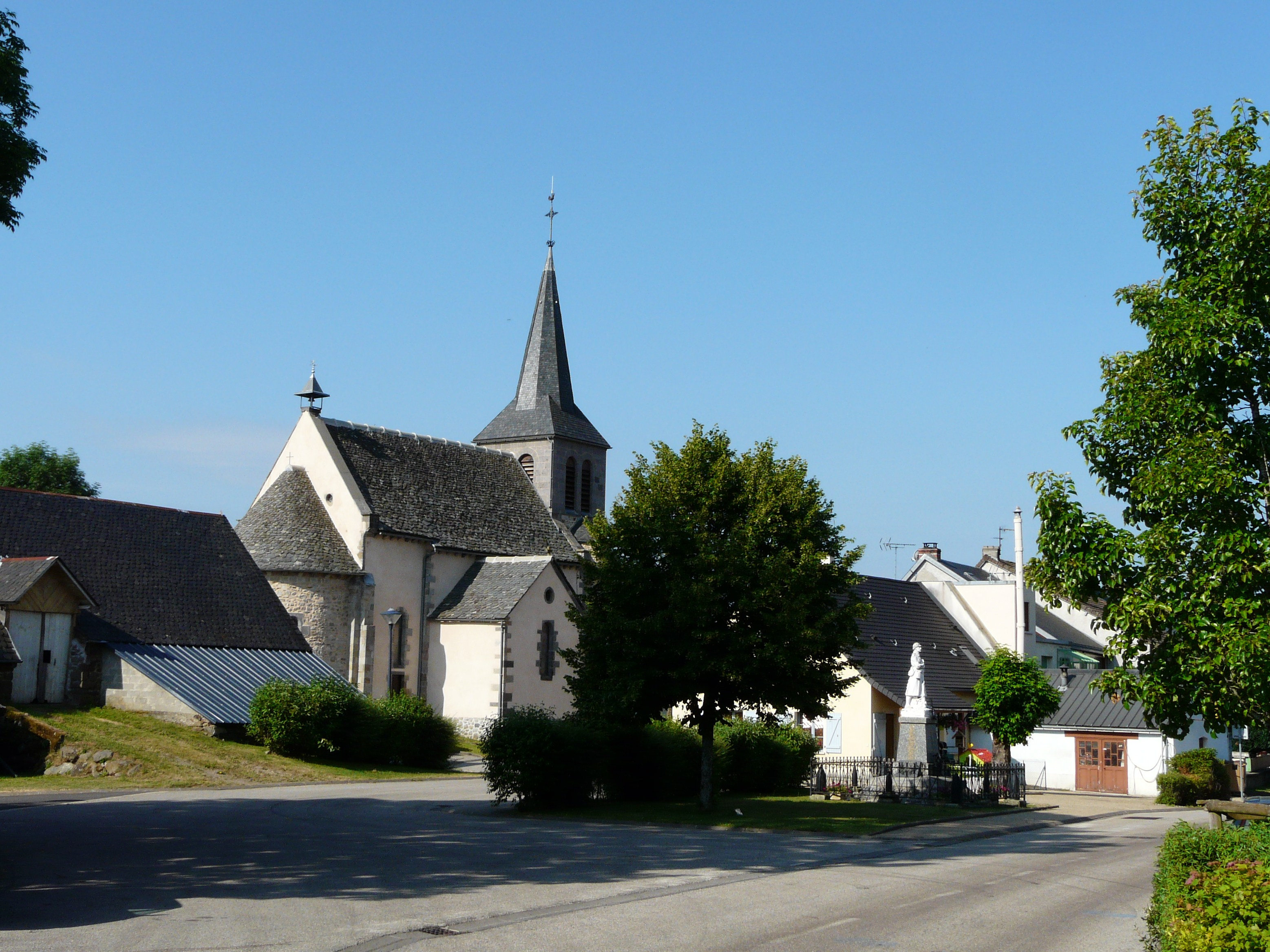 La place principale du village de Cros, Puy-de-Dôme, France.